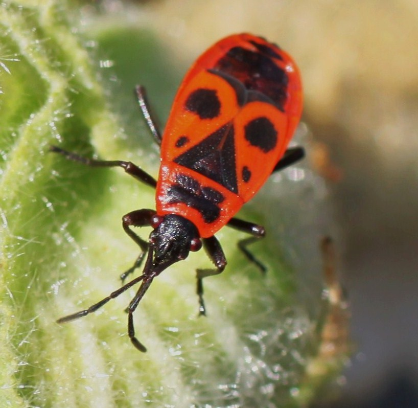 Une punaise rouge appelée plus communément "gendarme". Le nom scientifique de cet insecte est "Pyrrhocoris apterus". La photographie de cette punaise rouge sur une rose trémière a été prise dans un jardin à La Rochelle (France).